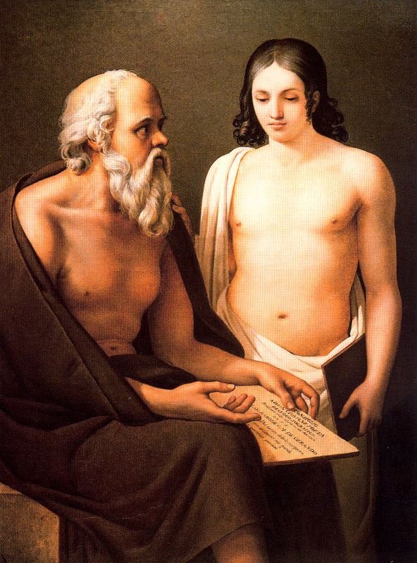 Socrate insegna a un giovane